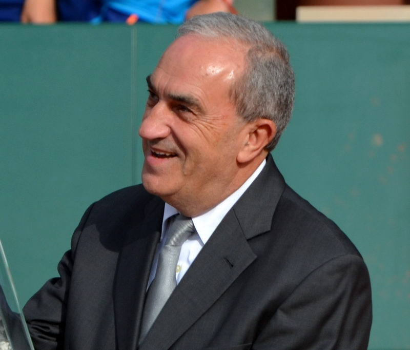 Jean Gachassin à Roland Garros